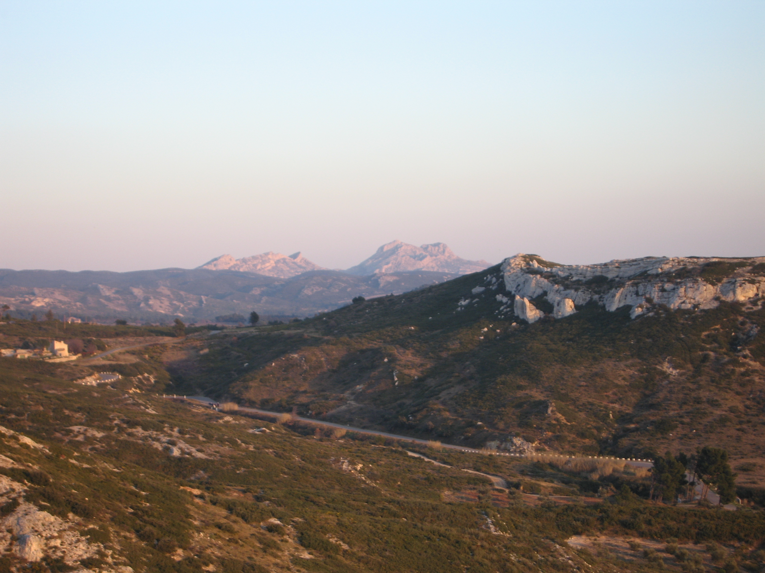 Les Alpilles